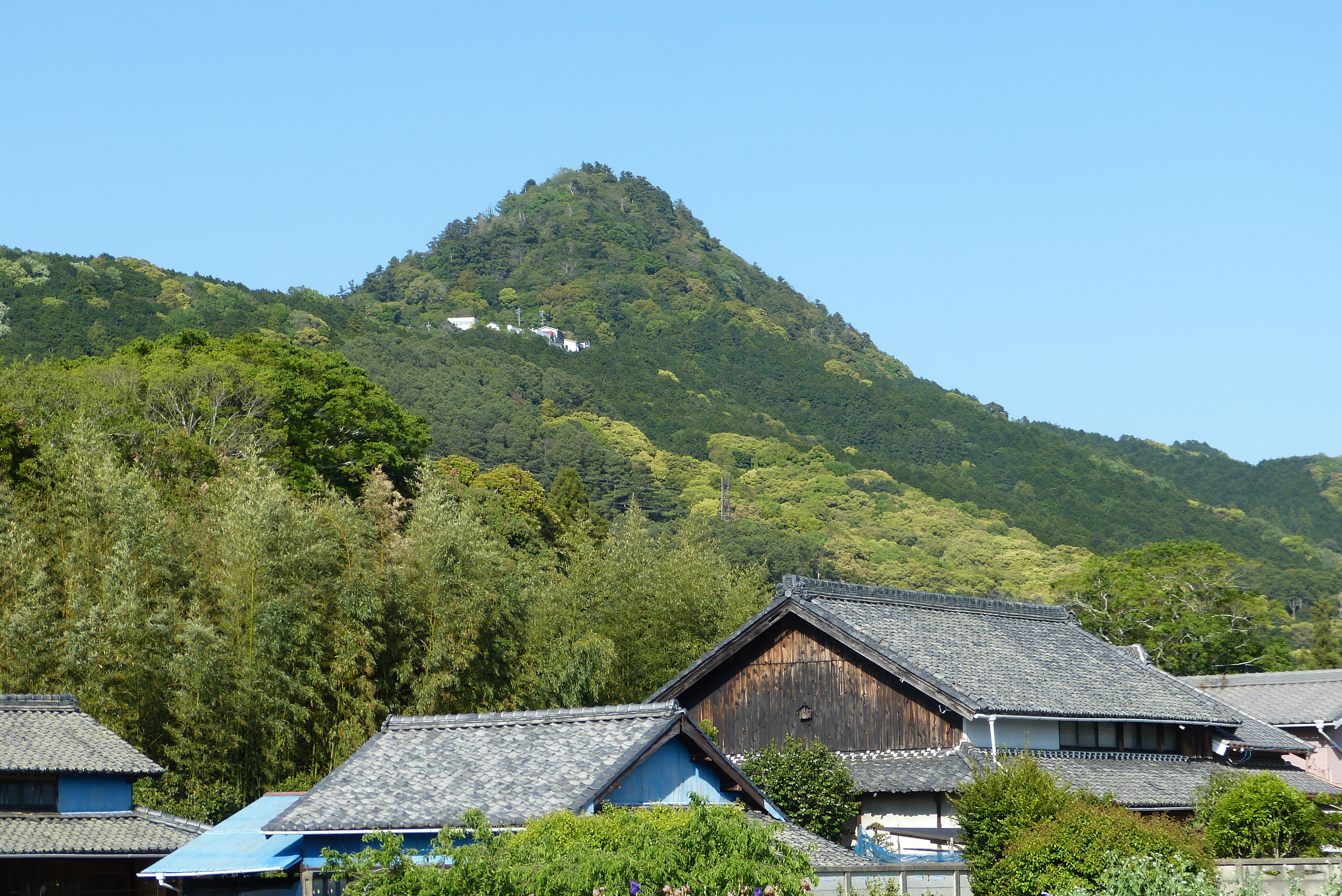 ５月初旬の石巻山を西南西から望む。